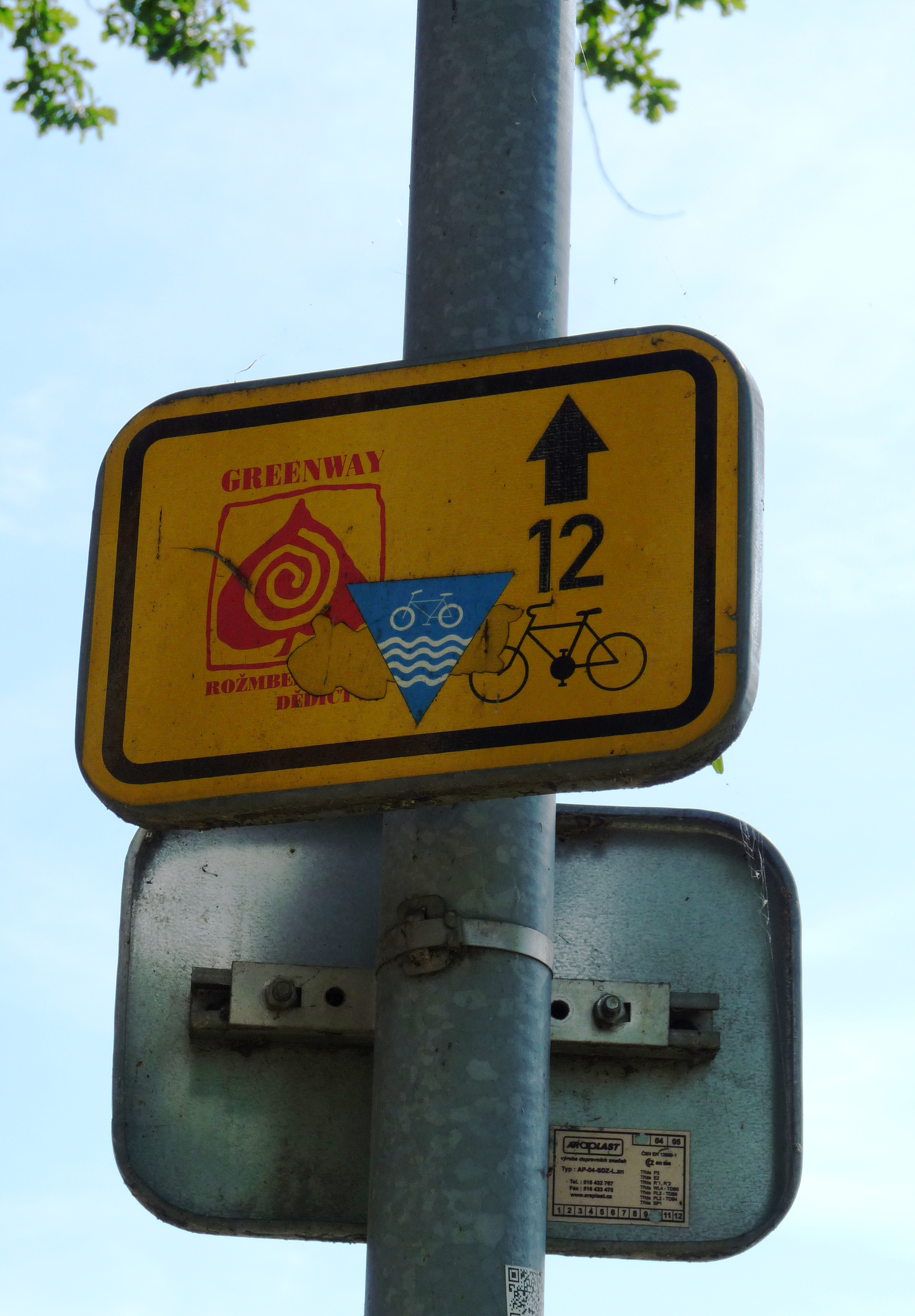 Cyklistická trasa č. 12 vedoucí podél Vltavy u fotbalového stadionu Dynama ČB, České Budějovice.